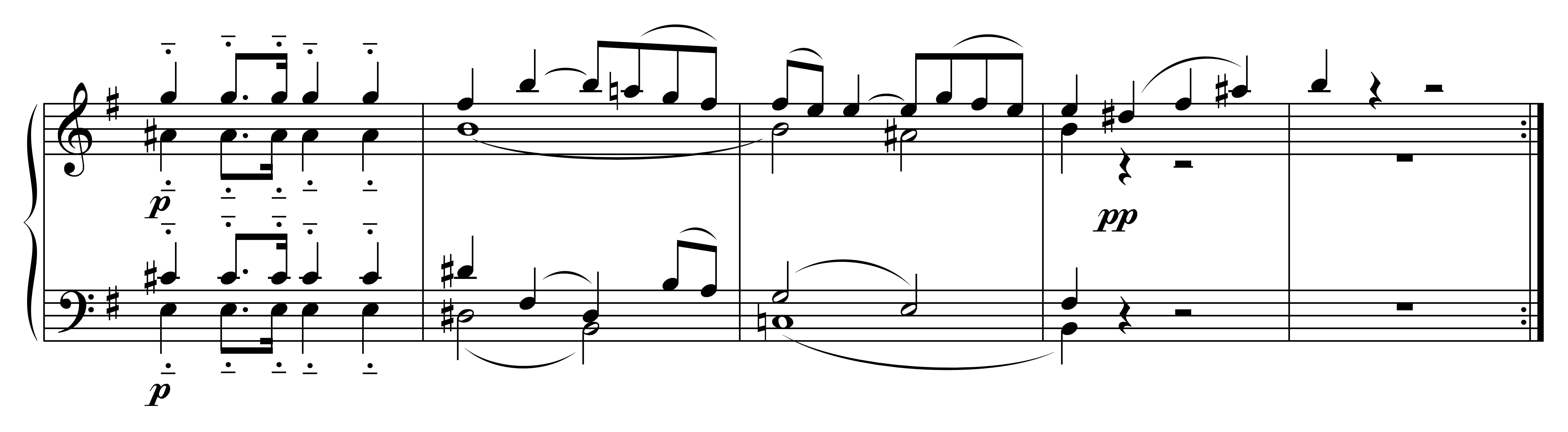 Notenbeispiel Haydn Sinfonie 44 - 1.Satz Schlussgruppe T. 57-61